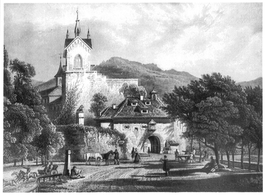 Schloss Eberstein bei Gernsbach, Ansicht von Westen, Stich nach einer Zeichnung von Carl Ludwig Frommel (1789–1863)